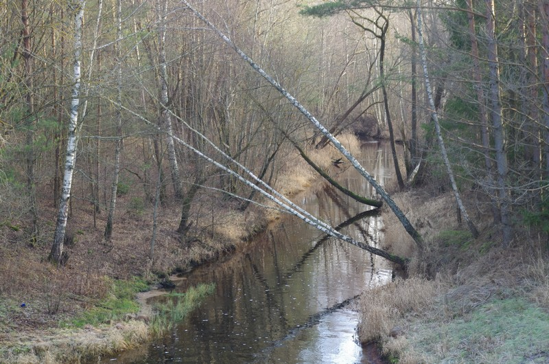 Aluotis ties Jotkonių tvenkiniu